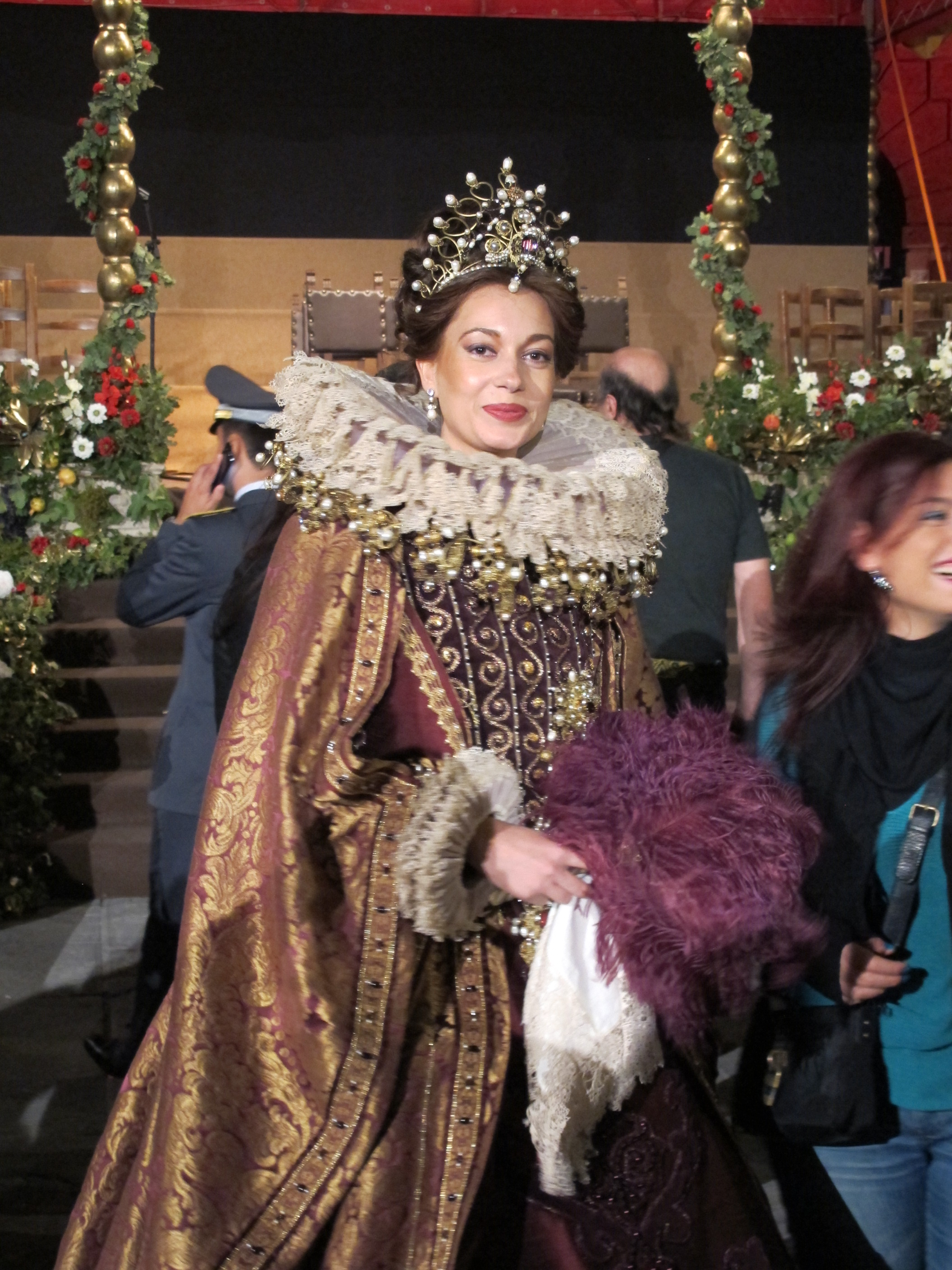 Quintana di foligno, parata